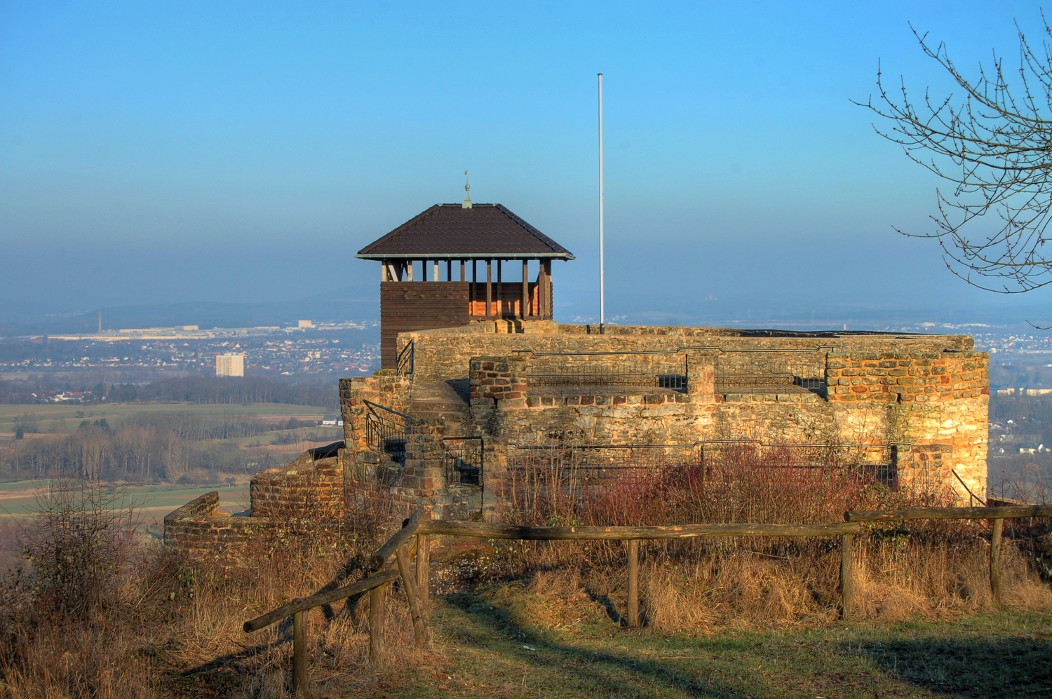 Die Teufelsburg in Felsberg mit Blick auf das Saartal